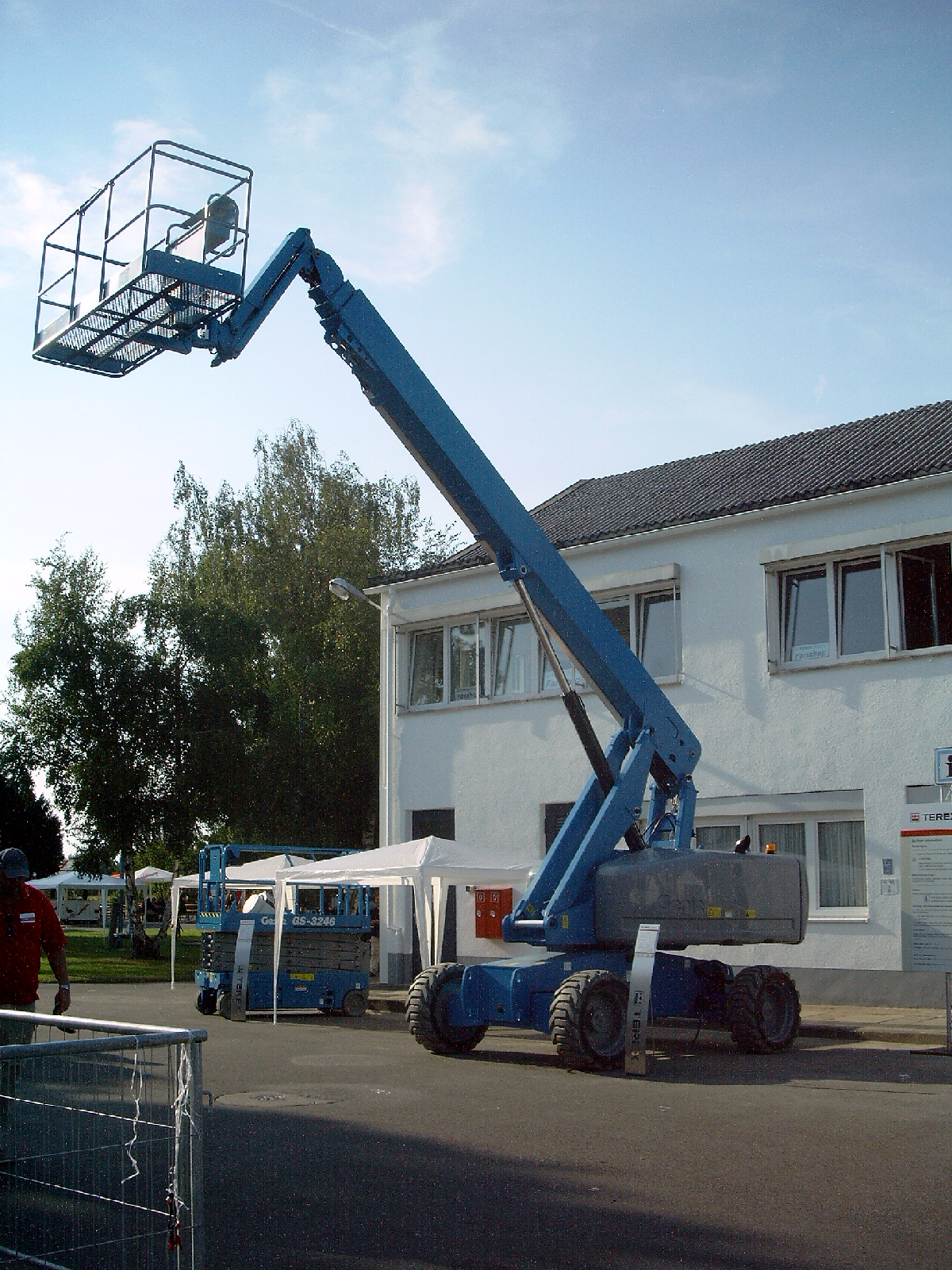 „Hebegenie“ /Hebebühne am Teleskoparm